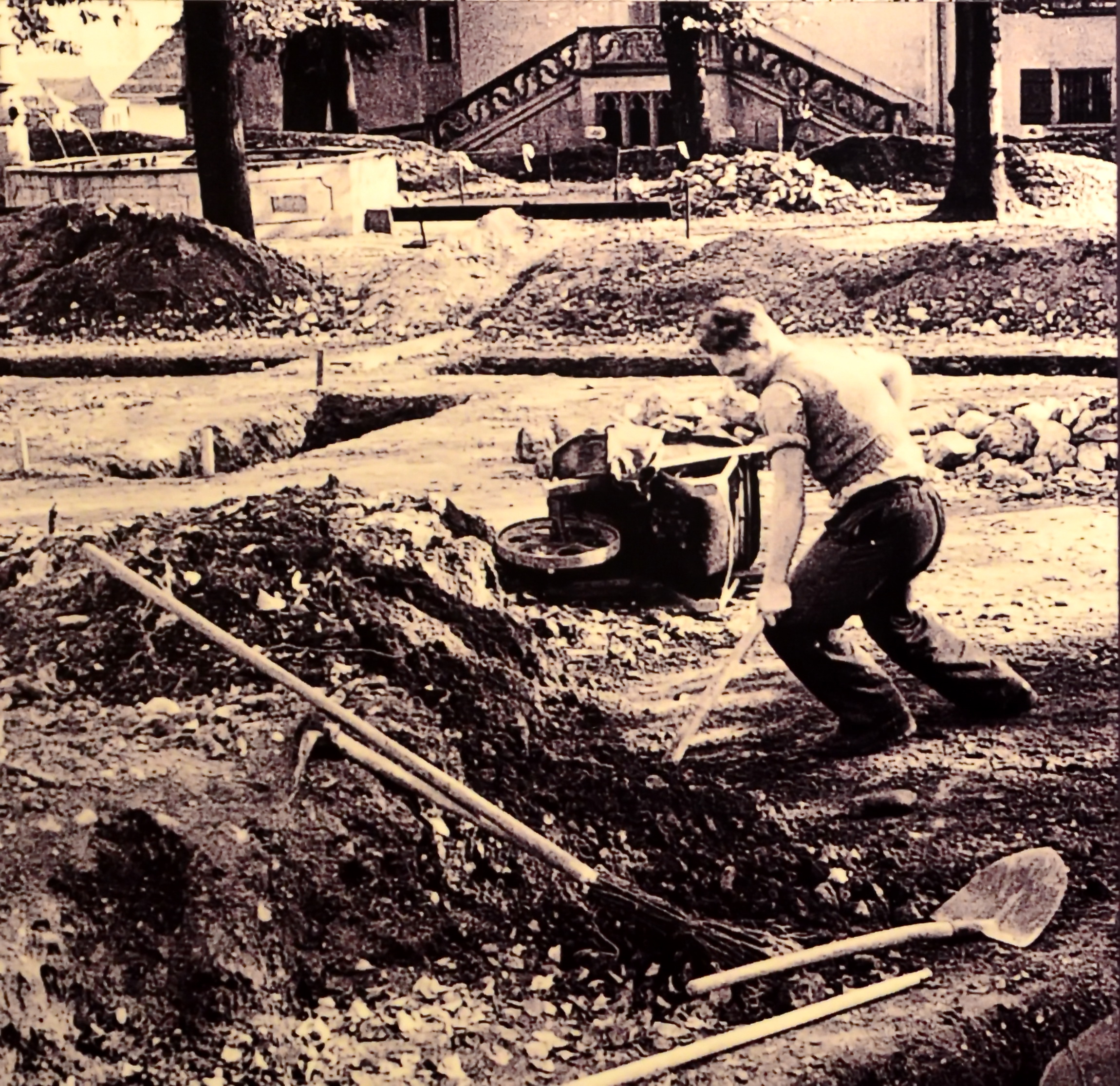 Lindenhof-Keller, Turicum (Zürich) : Die Ausgrabungen der Jahre 1937-1938 von Emil Vogt auf dem Lindenhof.